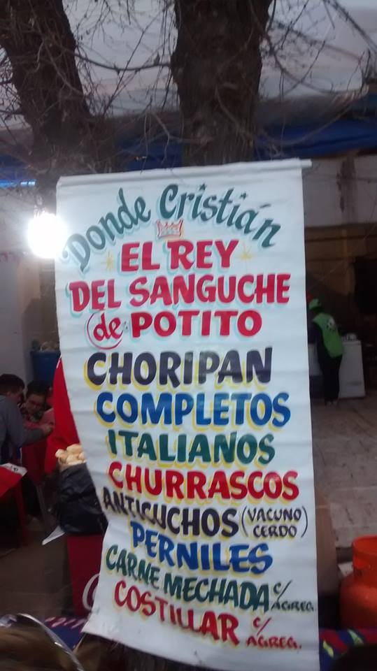 Cartel publicitario del autodenominado "rey del Sandwich de Potito" en las fondas del Estadio Nacional en Ñuñoa, Chile, durante las Fiestas Patrias de 2015